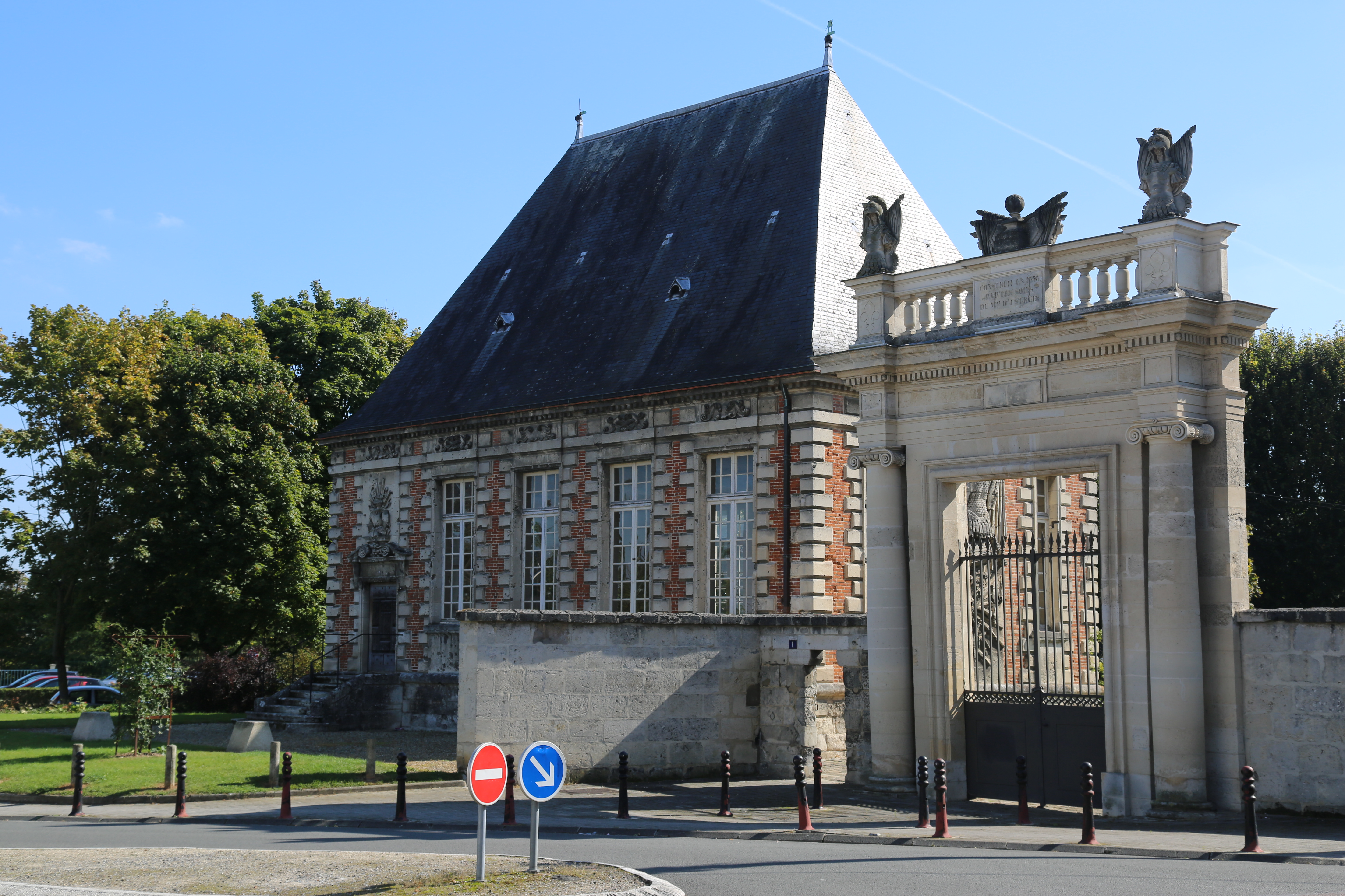 Pavillon de l'Arquebuse